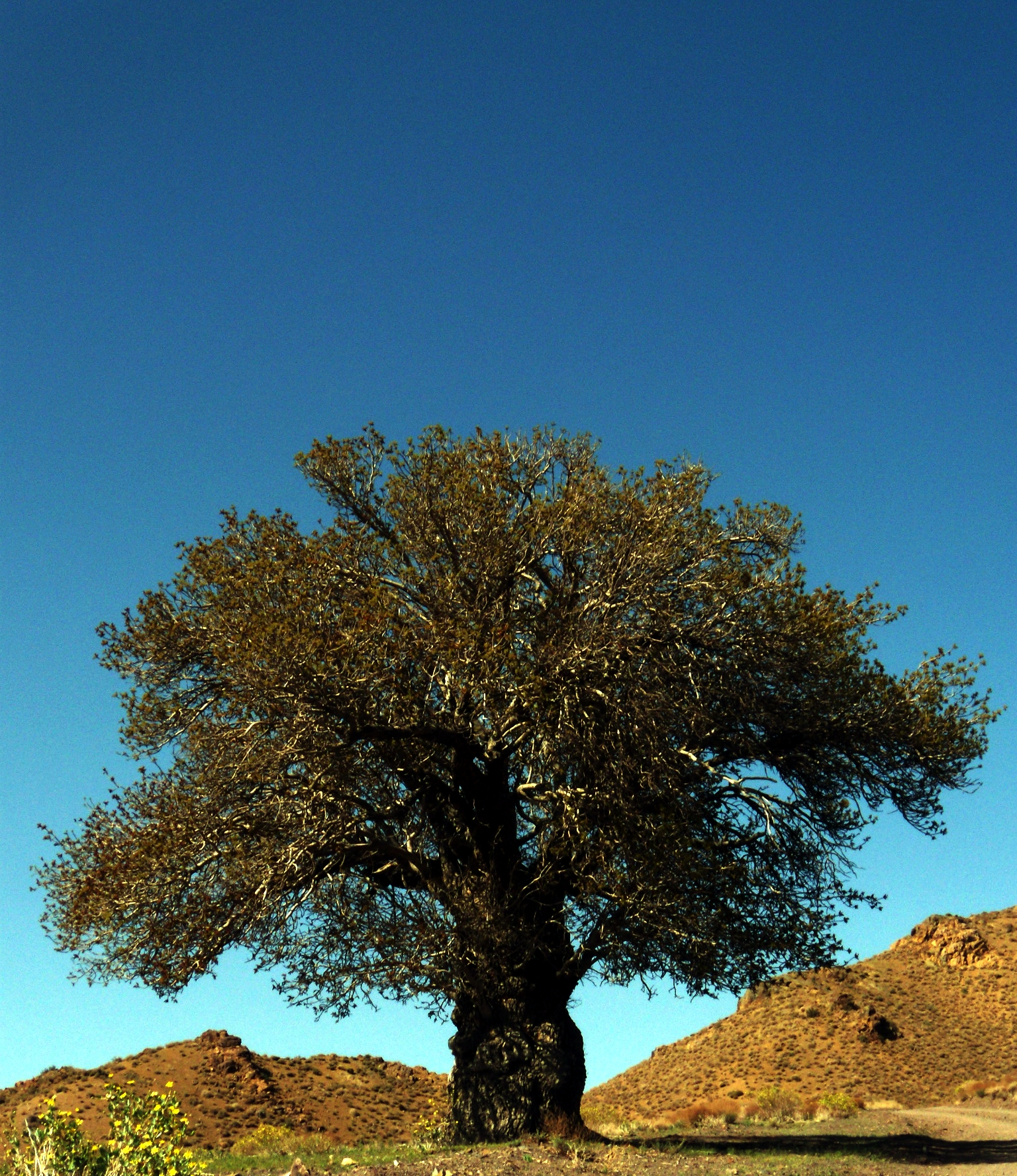 درخت بنه در روستای ریگو از توابع رفسنجان